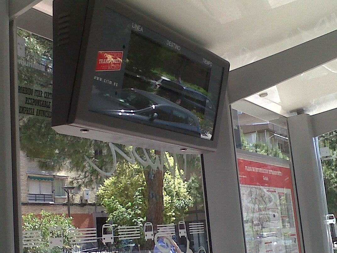 Panel de información en tiempo real.